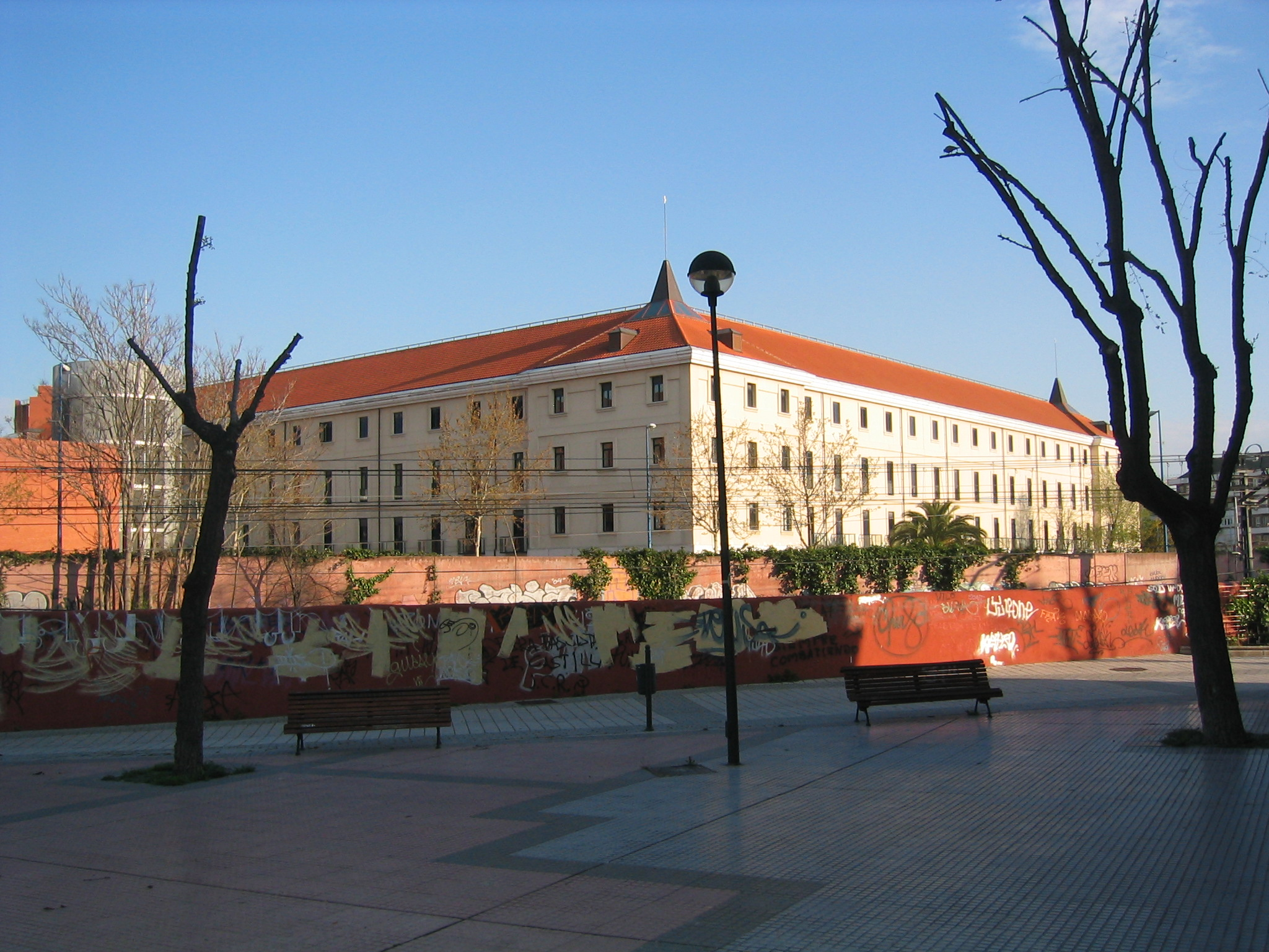 Escuela Politécnica Superior de la Universidad Carlos III de Madrid. Campus de Leganés.